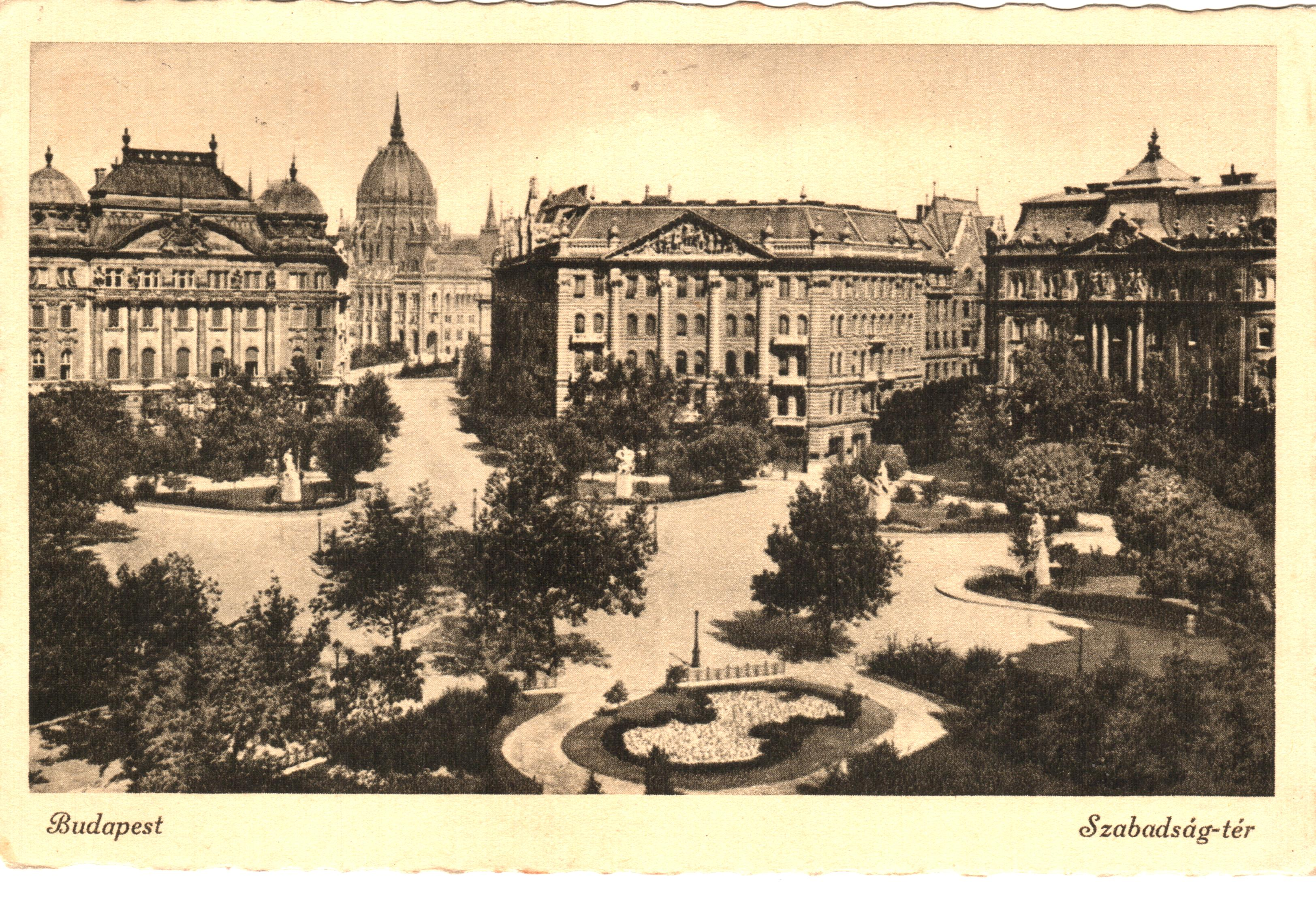 Szabadság híd, 1940. Budapest. A képeslap hátoldalával együtt megjelent Creative Commons alatt a Metapolisz DVD sorozatban.